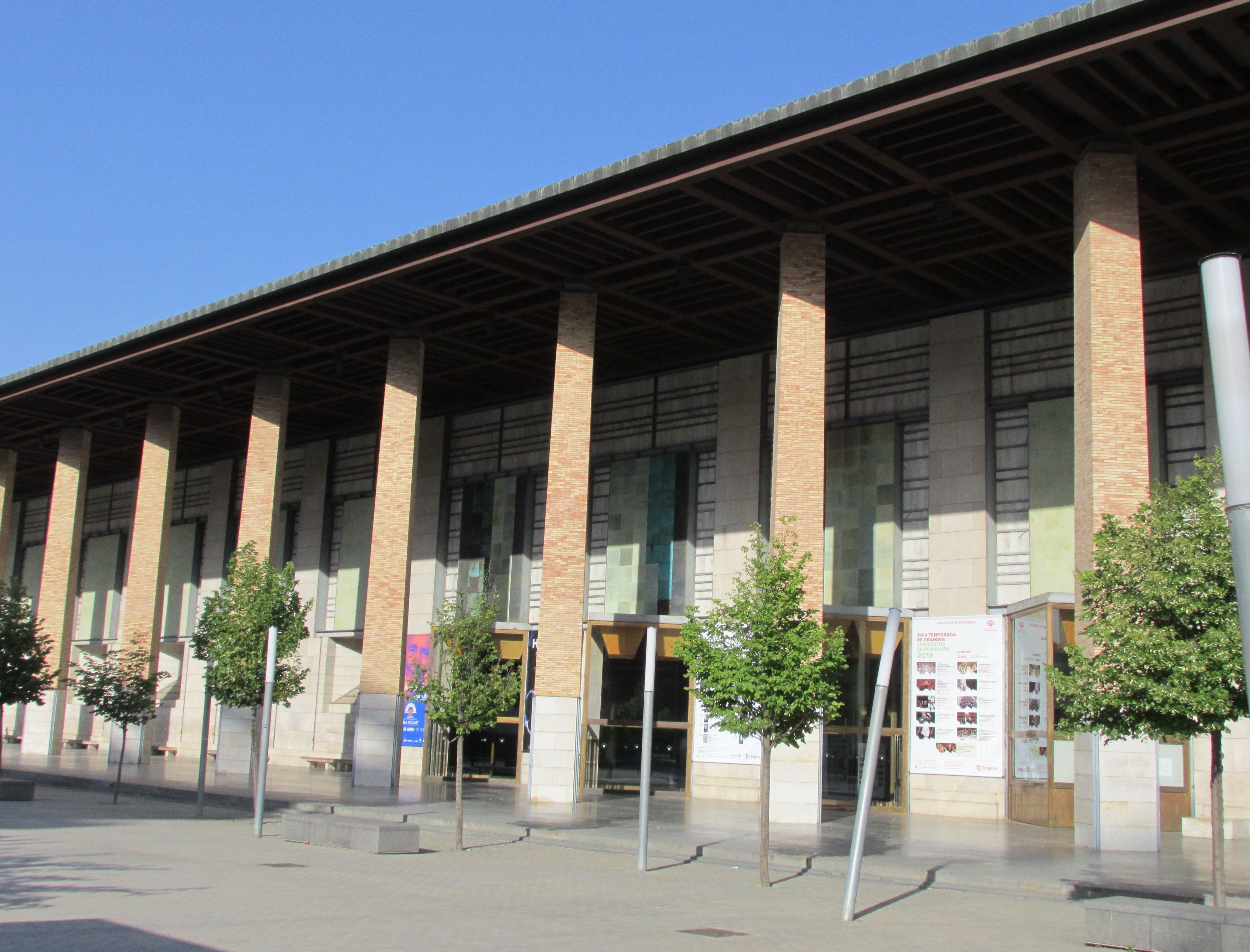 Auditorio de Zaragoza.